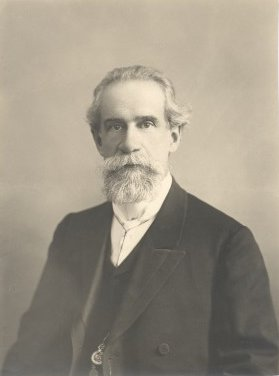 Boriss Sreznevski (1857–1934), Tartu ülikooli loodusgeograafia ja meteoroloogia professor .